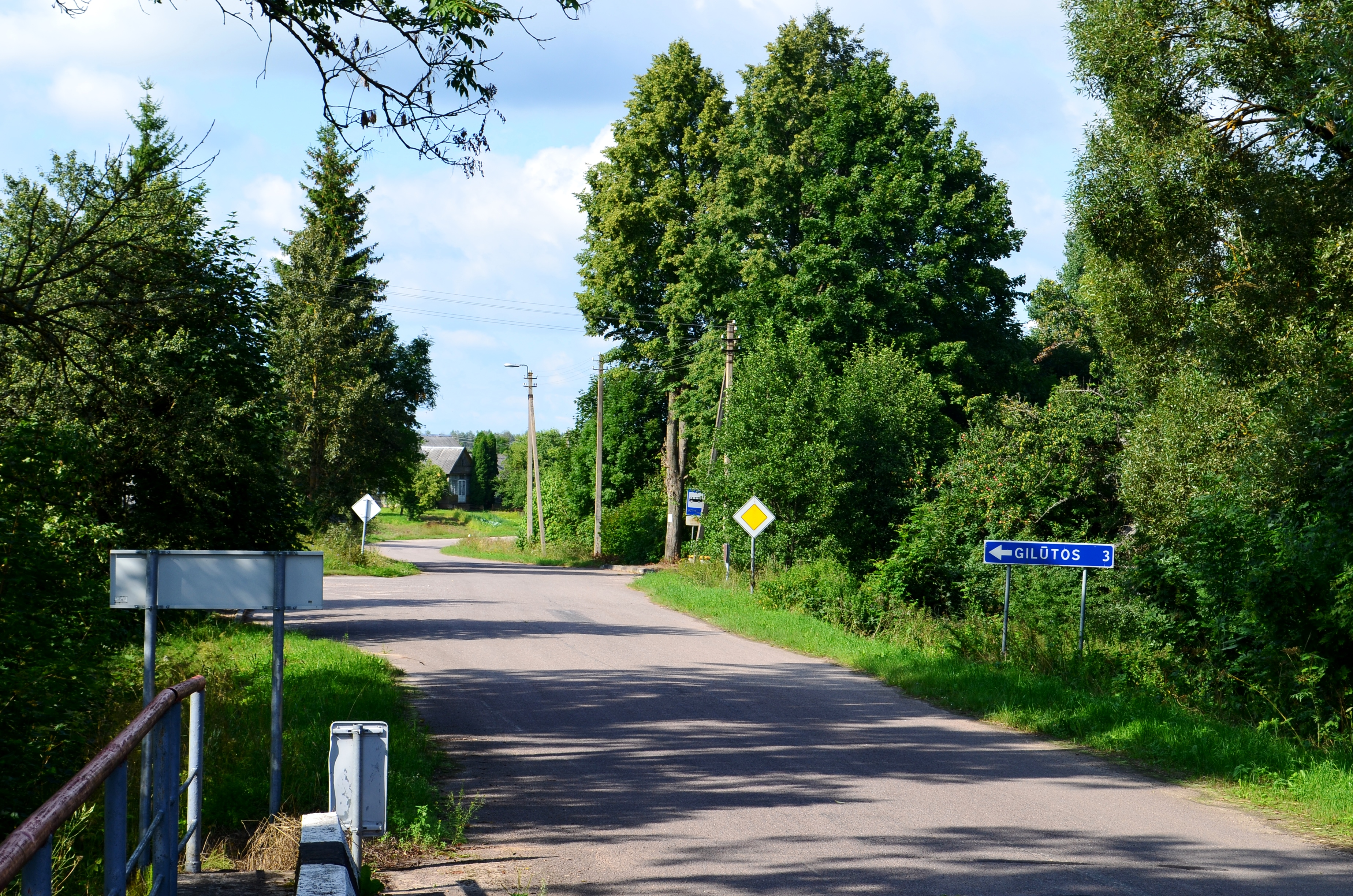 Raščiūnų k., Mielagėnų sen., Ignalinos raj.